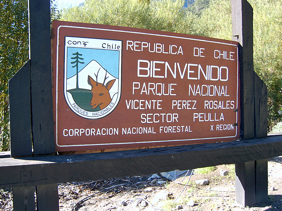 Eingang zum Natioanlpark Vicente Pérez Rosales in Peulla